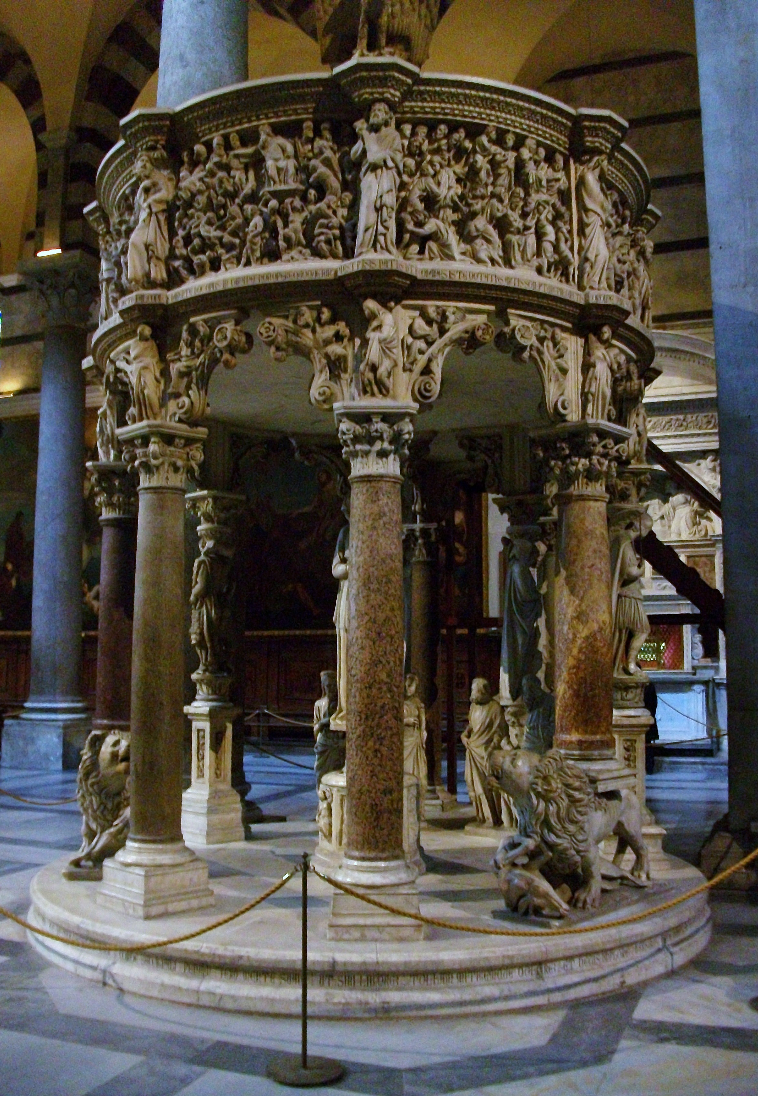 Púlpit de la catedral de Pisa; Giovanni Pisano.